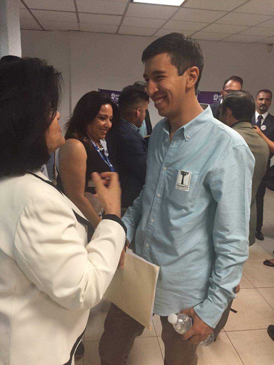 Pedro Kumamoto Aguilar saliendo del debate entre candidatos a diputados organizado por la televisora Ocho TV.